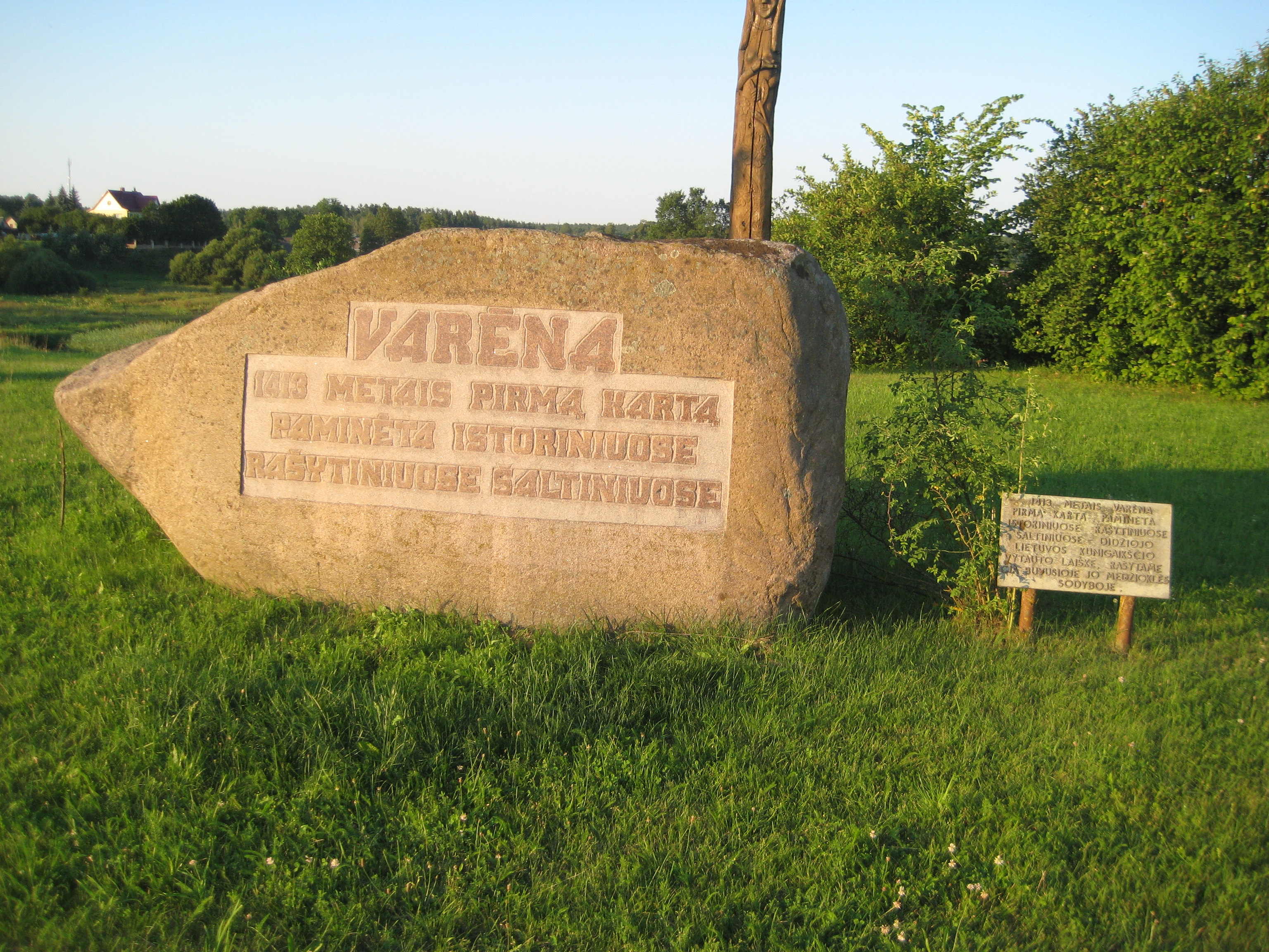 Varėnos sen., Lithuania